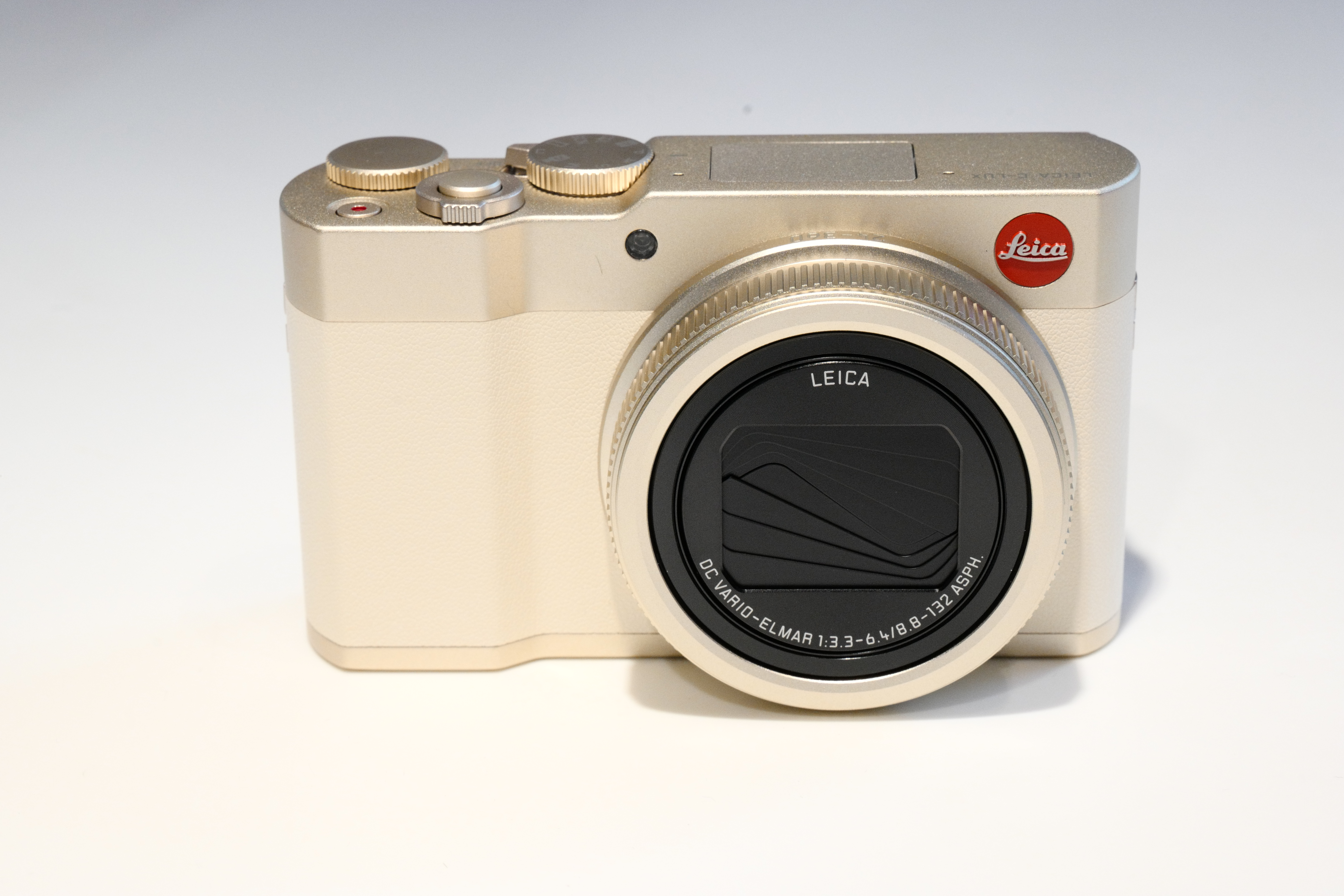 Leica C-Lux Light-Gold